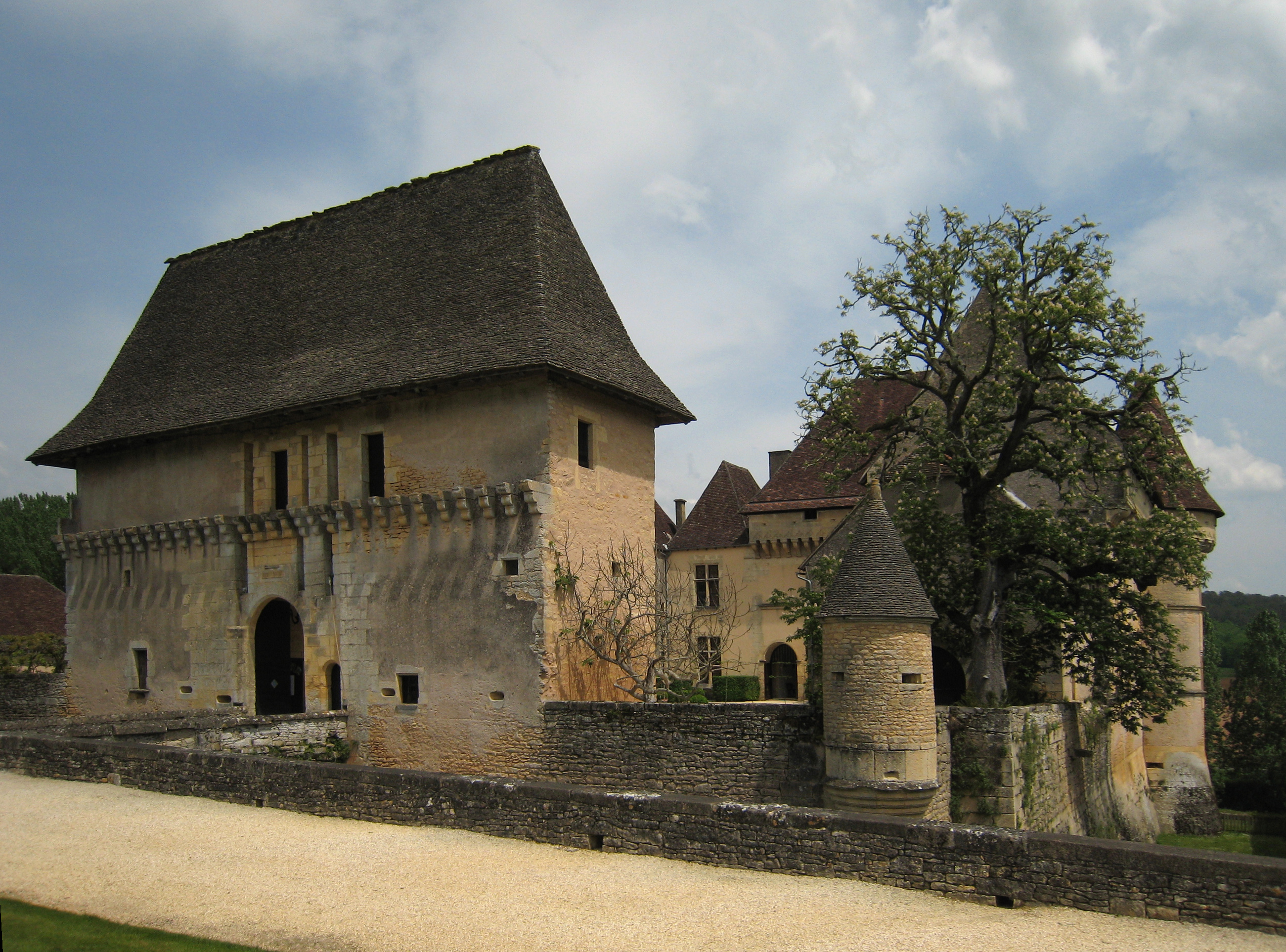 Chateau de Losse, Département Dordogne/France